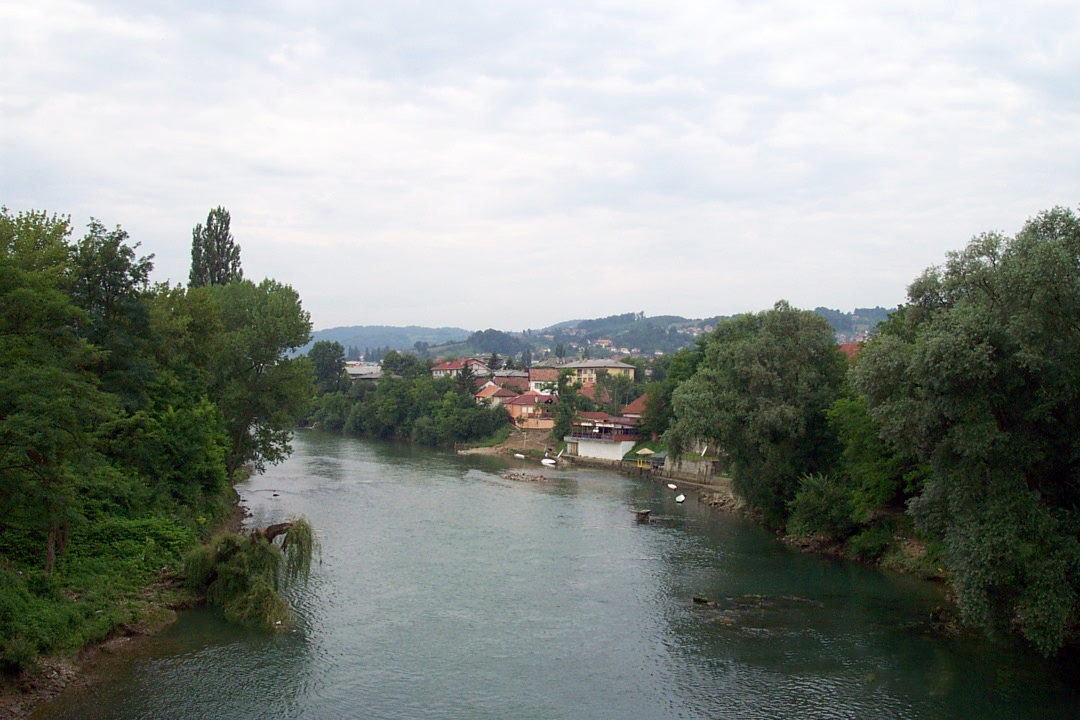 Řeka Vrbas, protékající Banja Lukou